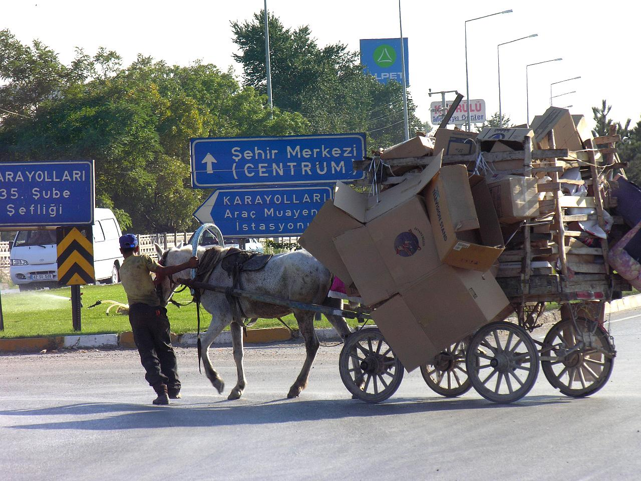 Turkey-2215